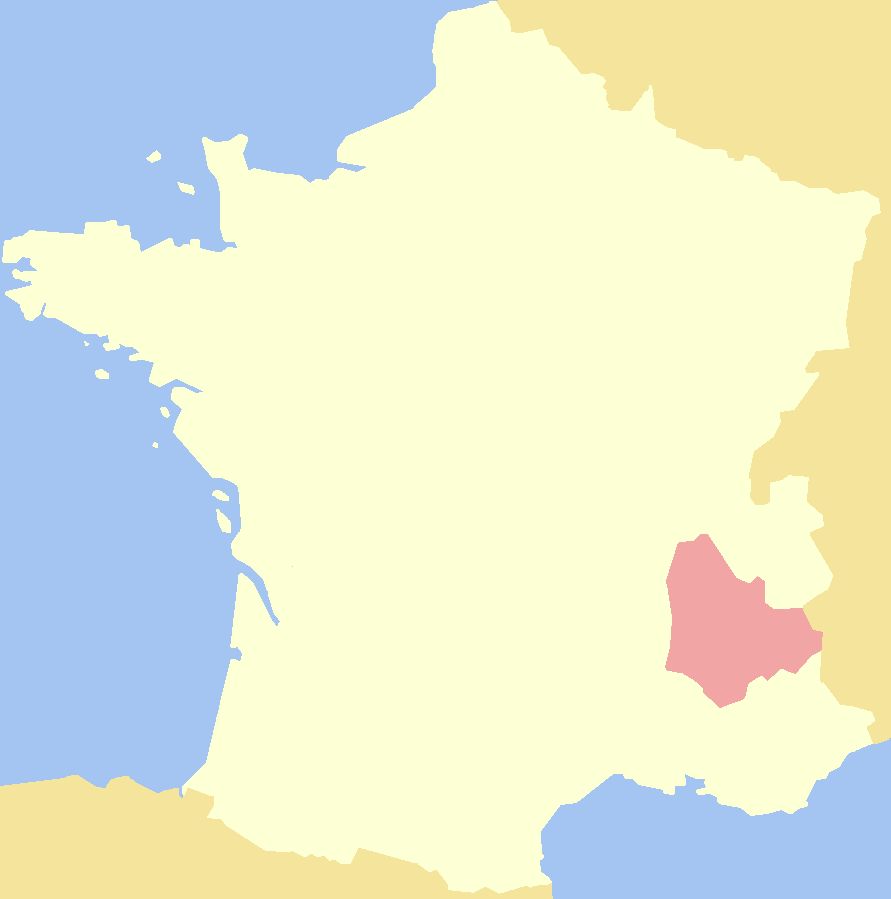 Dauphiné.